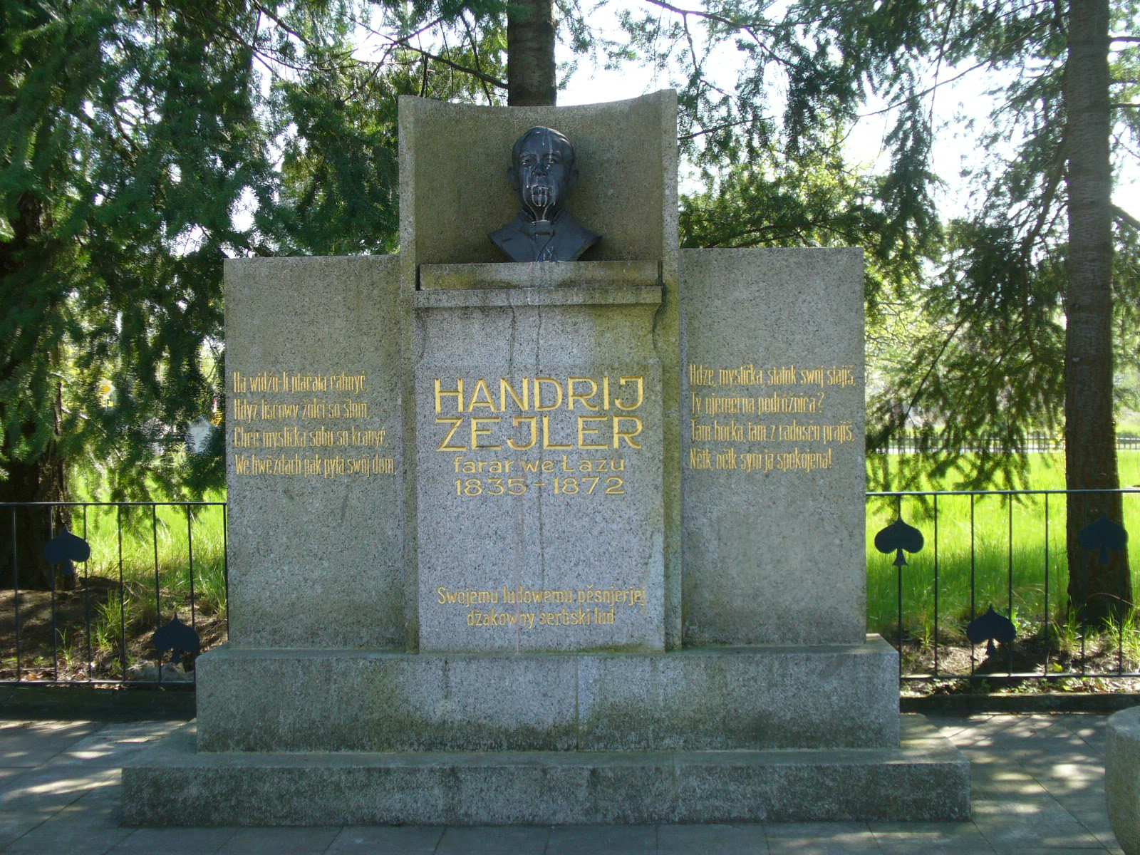 Lohsa. Handrij Zejler, Denkmal auf dem Marktplatz in Lohsa. Einweihung 30.08.1931 Hornjoserbsce: Pomnik Handrijej Zejlerjej we Łazu